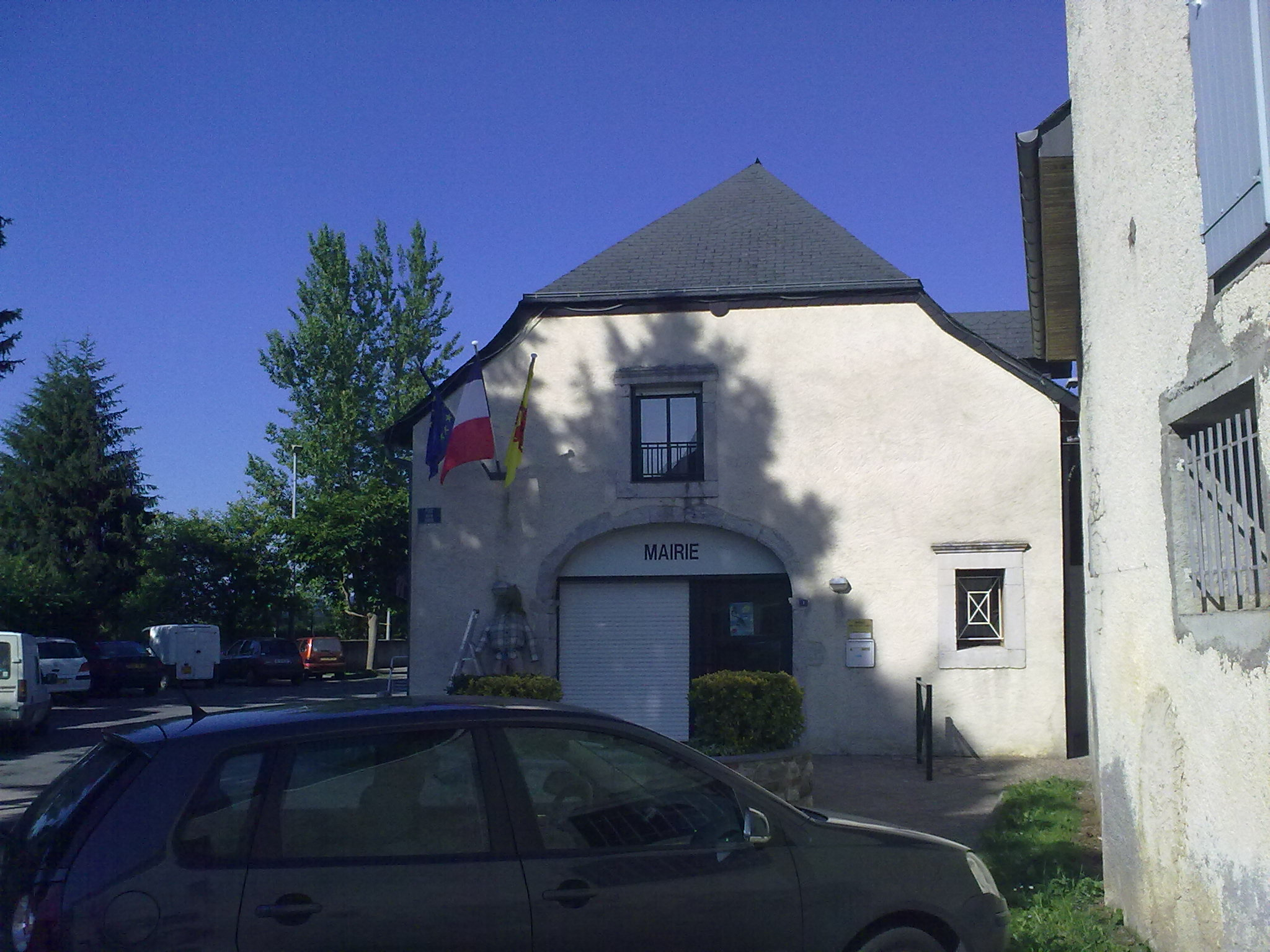 Mairie de Saint-Abit.